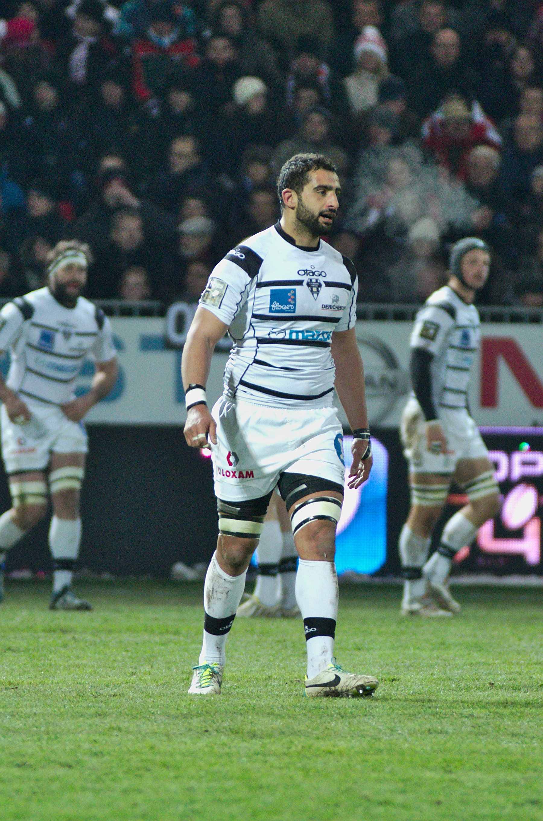 USO-CAB - 20131130 - Saïd Hireche